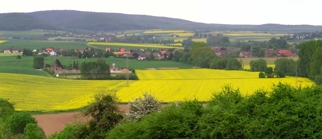 Blick auf Scharfoldendorf, Landkreis Holzminden, Deutschland. Standort: Wiese bei Oelkassen.